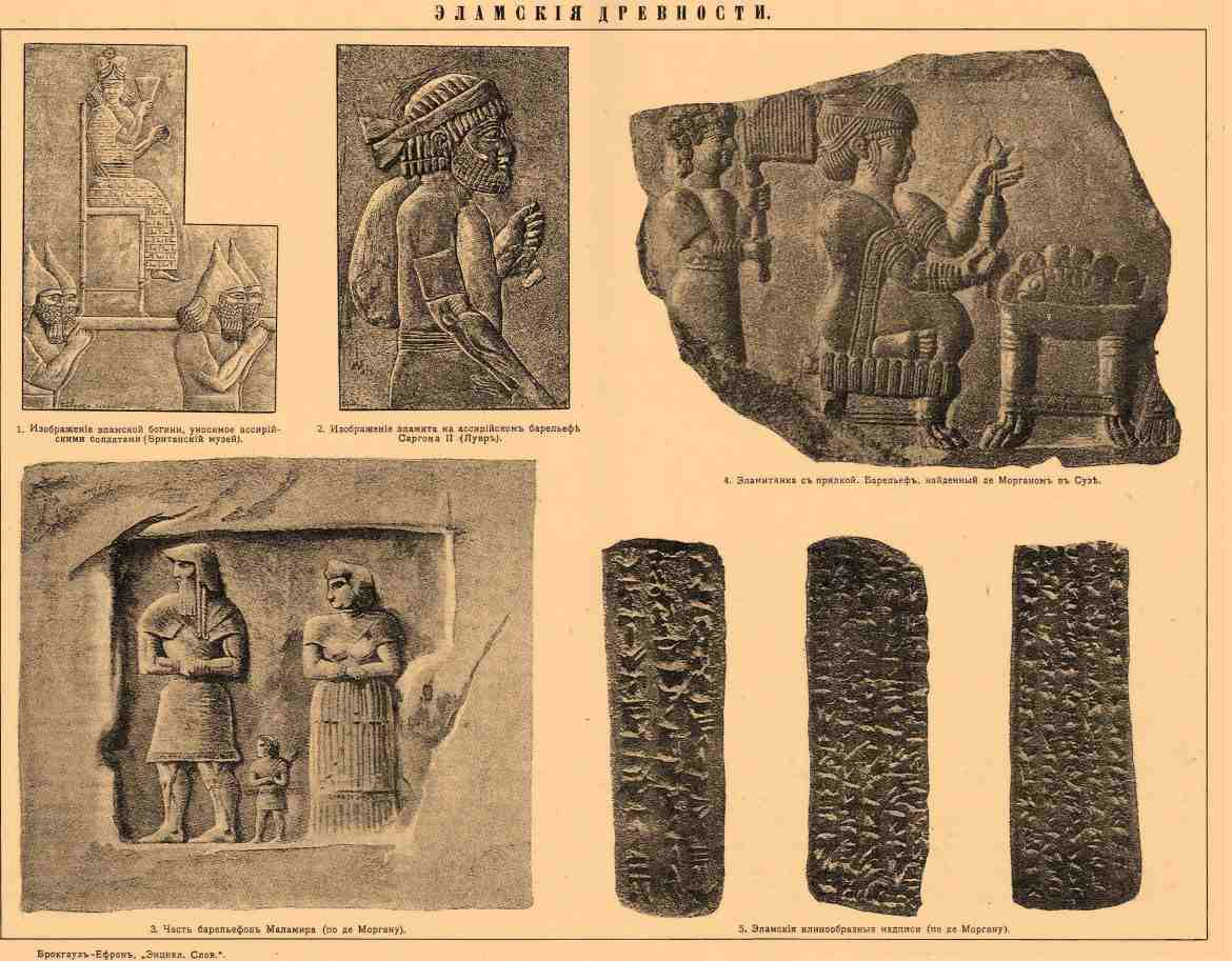 Иллюстрация к статье Элам из энциклопедии Брокгауза и Ефрона